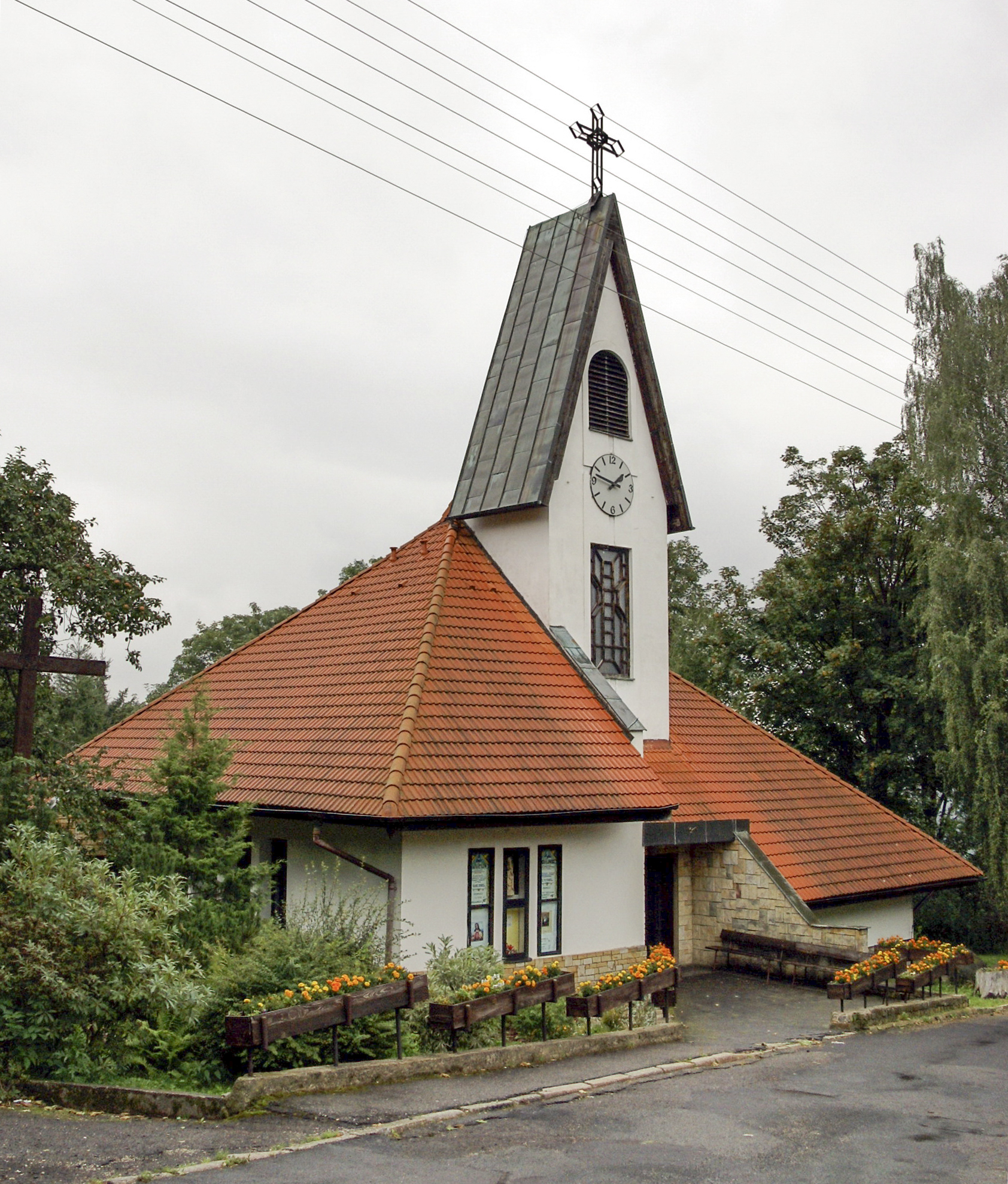 Kościół p.w. Marii Matki Kościoła w Michałowicach (Piechowice).